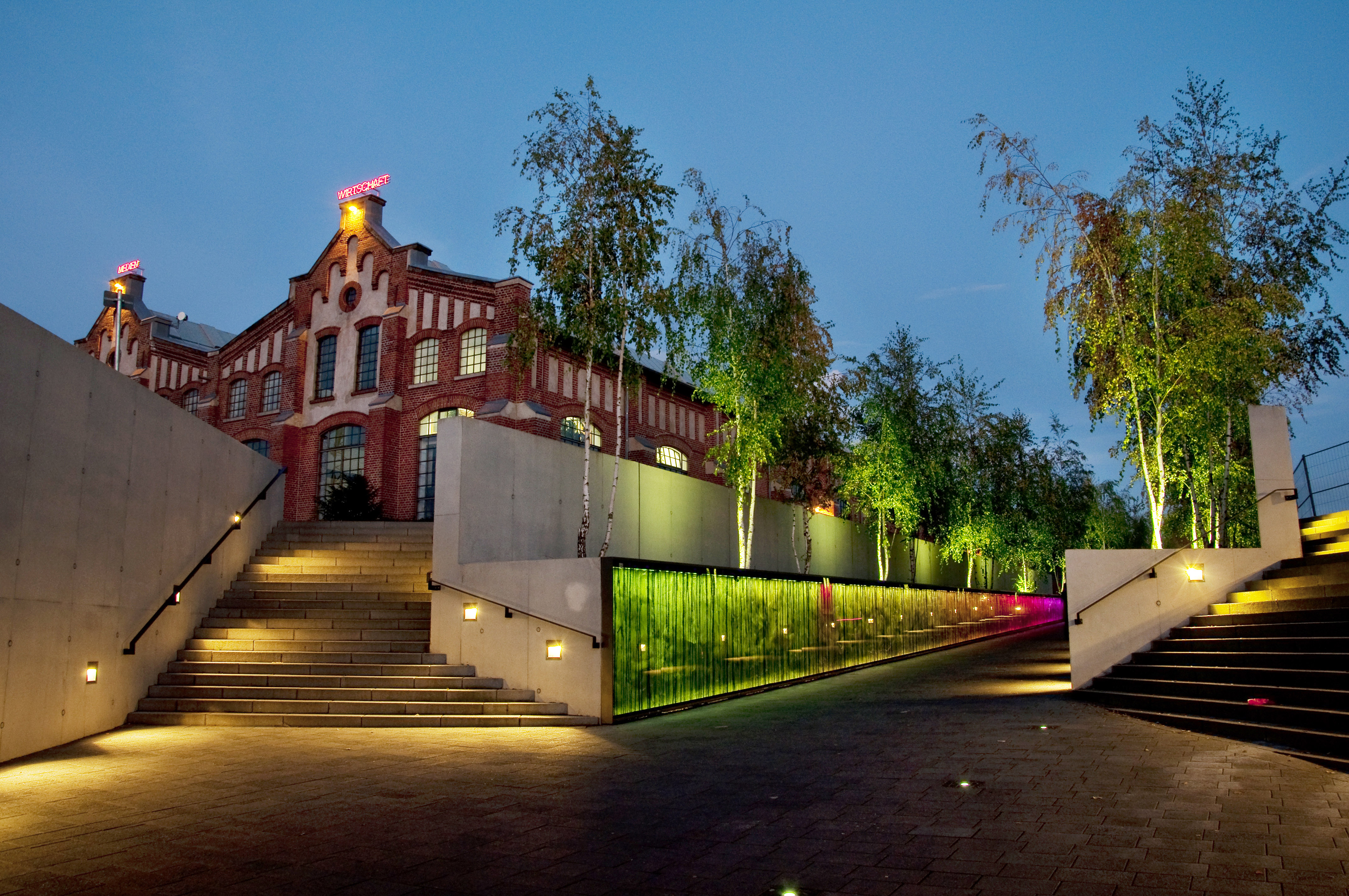 Fußgänger- und Radfahrerunterführung am Bahnhof